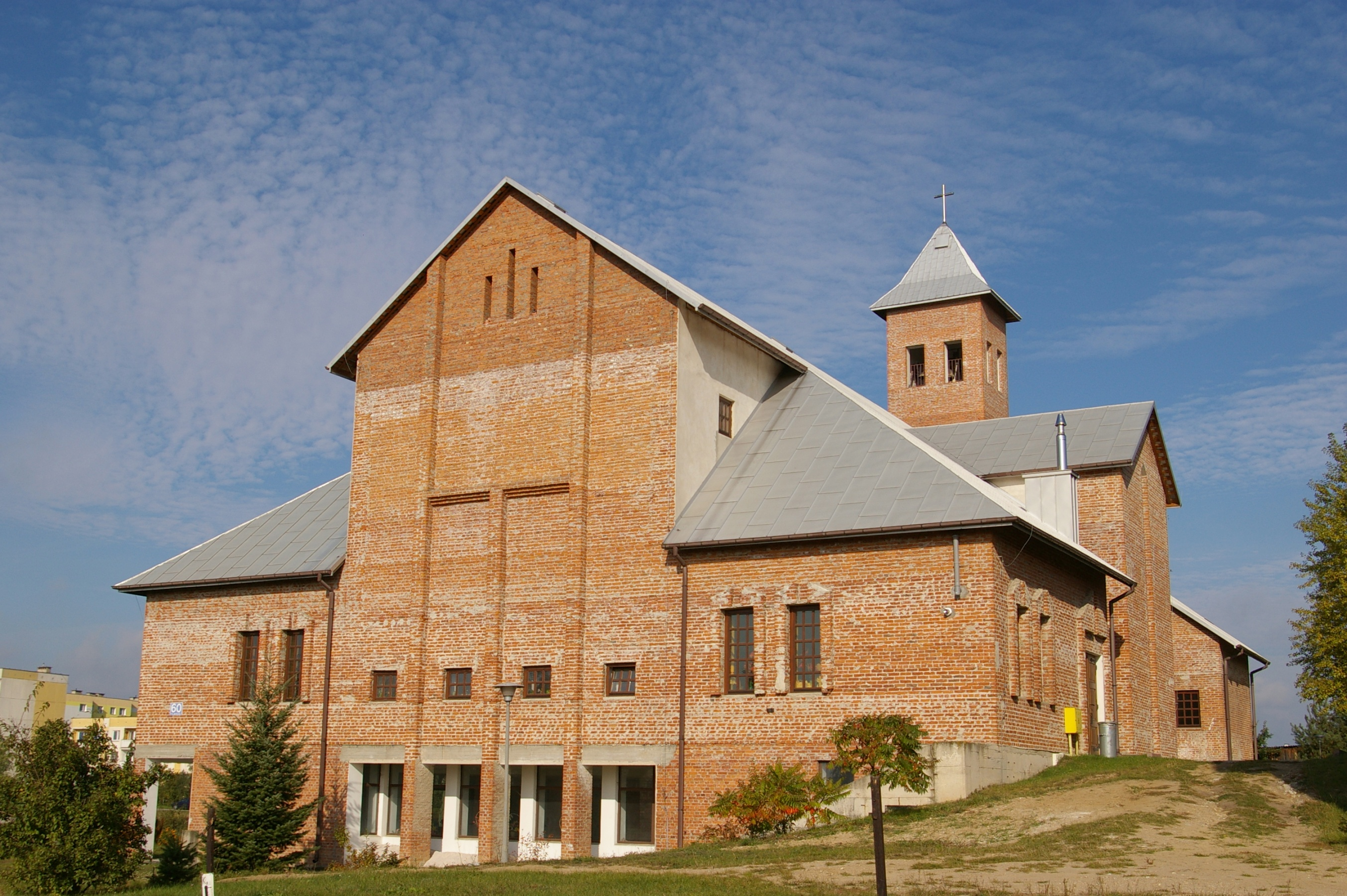 Kościół Matki Odkupiciela w Ostrowcu Świętokrzyskim